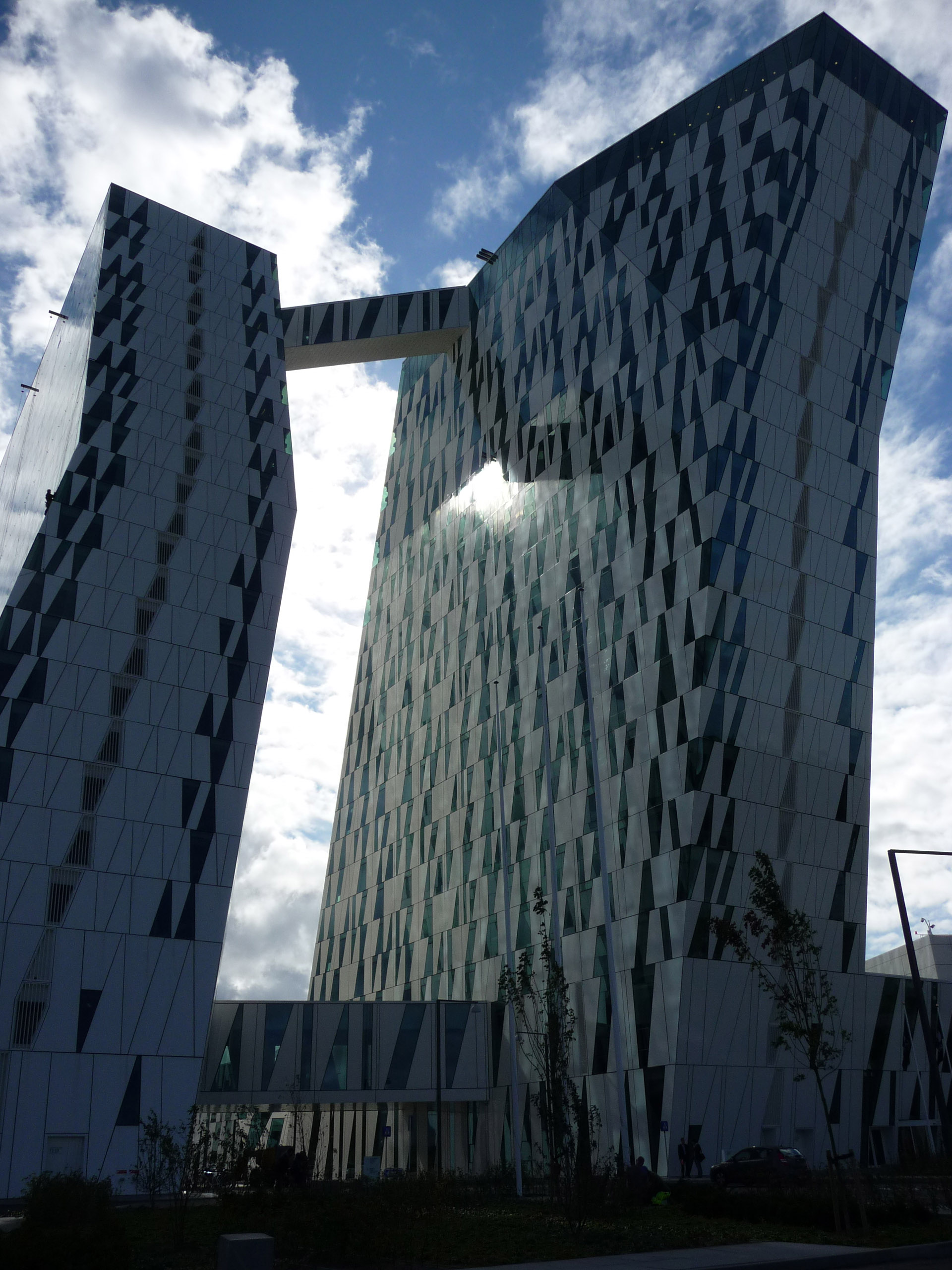 Hotel Bella Sky ( in Kopenhagen, Dänemark